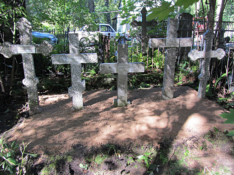 Надгробие Теляковских на Серафимовском кладбище (С.-Пб.): Всеволод Владимирович (1894-1963), Владимир Аркадьевич (1860-1924), Вячеслав Владимирович (1891-1950), Гурли Логиновна (1850-1922), Баскова Прасковья Федоровна (1894-1966), жена Вячеслава